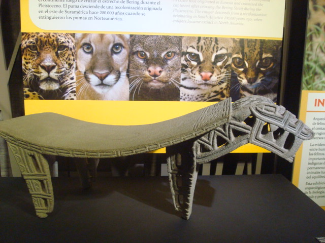 Metate en forma de jaguar, con efigie vaciada, proveniente del Pacífico Norte de Costa Rica. 800-1350 d.C. Museo del Oro Precolombino. Costa Rica.